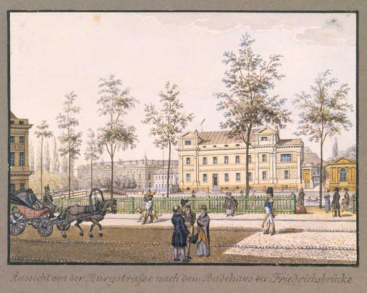 Welpersches Badehaus an der Friedrichsbrücke in Berlin, nach 1804